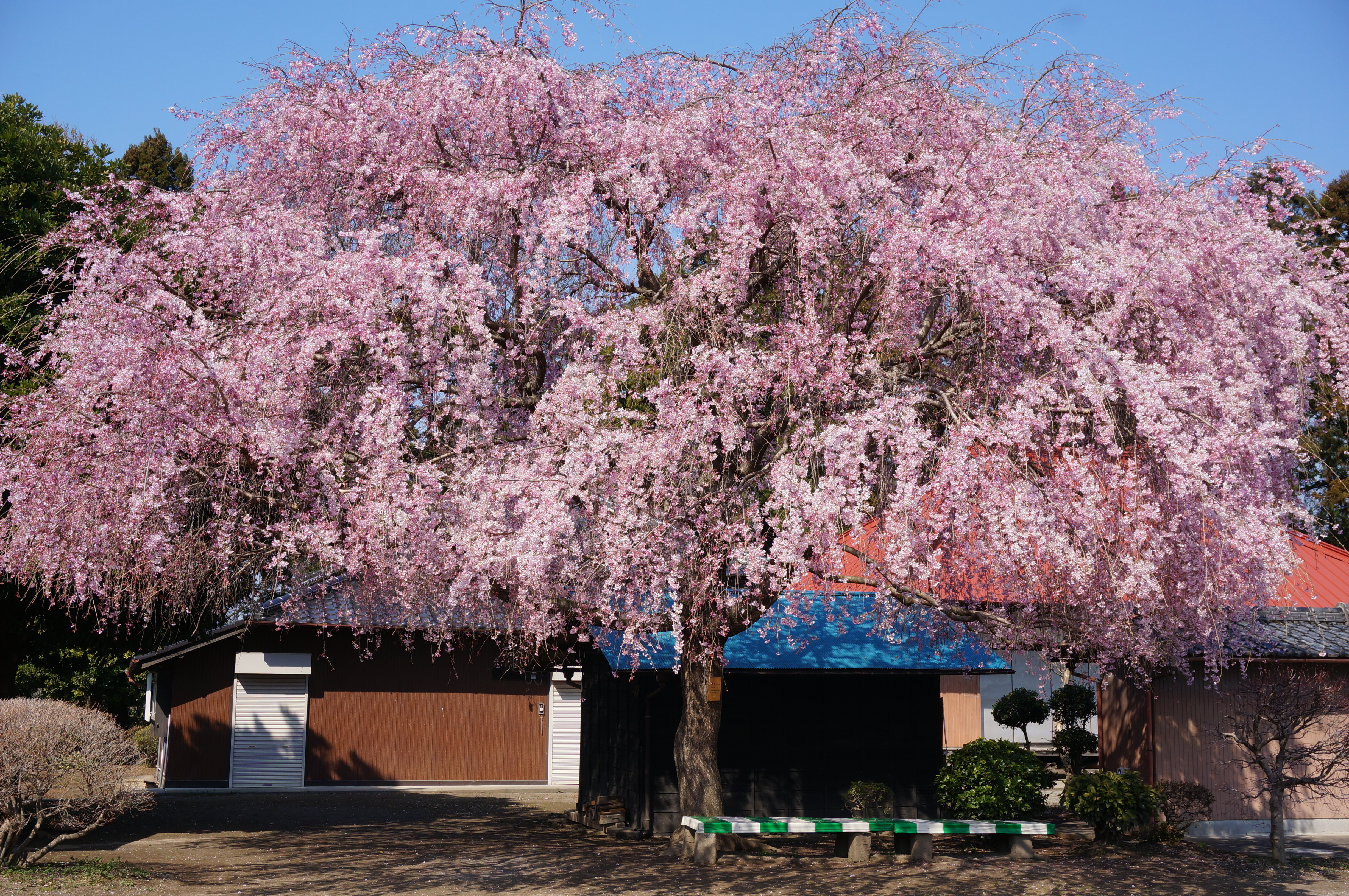 埼玉県北本市の放光寺にある三春滝桜の子孫樹。